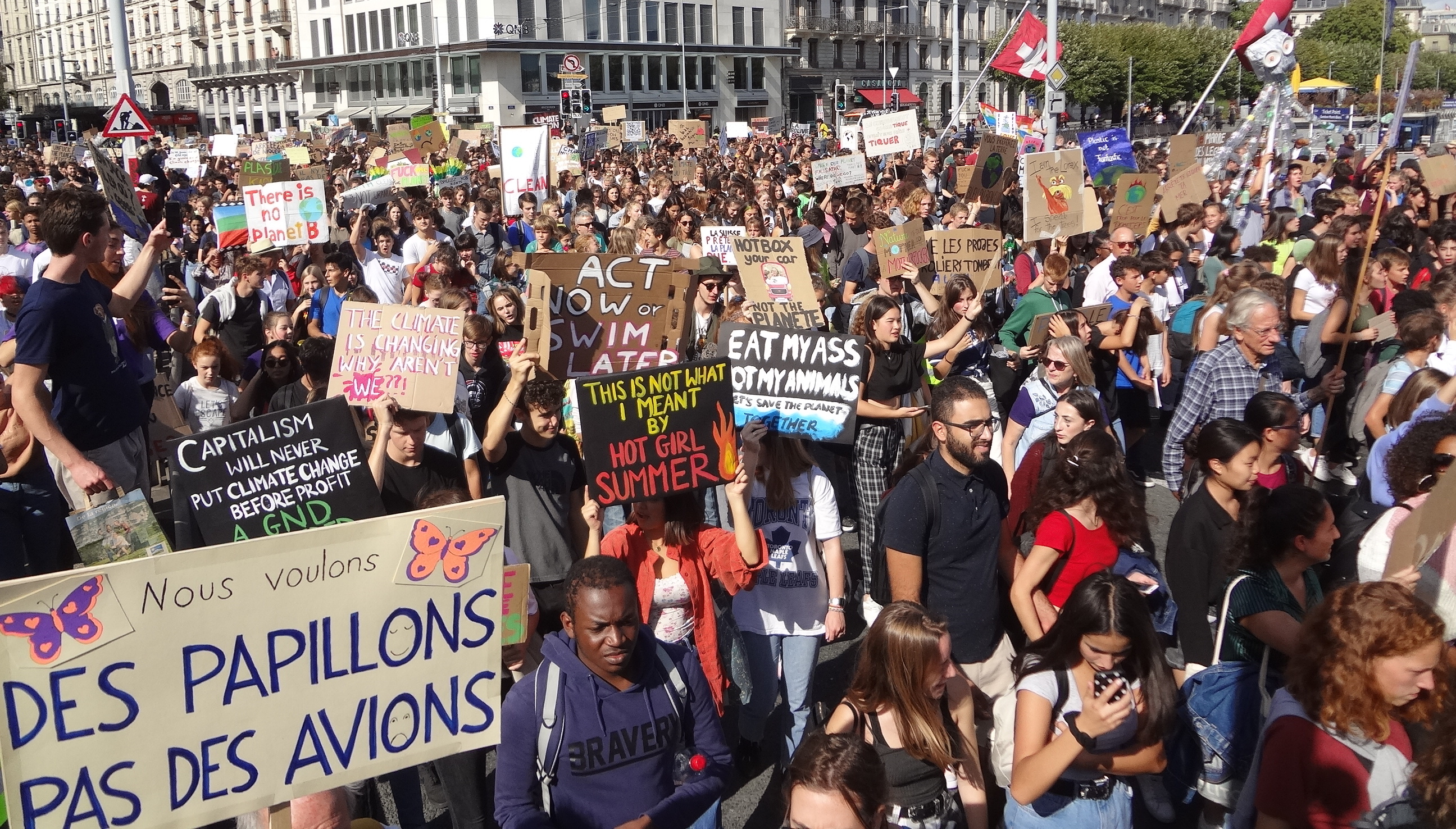 Manifestation pour le climat et grève des étudiants à Genève le vendredi 27 septembre 2019. Pont du Mont-Blanc.